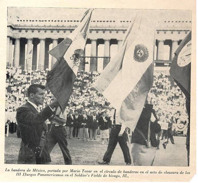 mario tovar abanderado de la delegacion deportiva mexicana en los III Juegos Deportivos panamericanos Chicago 1959